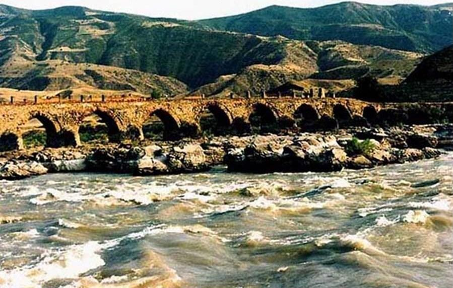 Асландуз — Брод на р.Аракс. Именно здесь Котляревский нанес персам неожиданный удар.